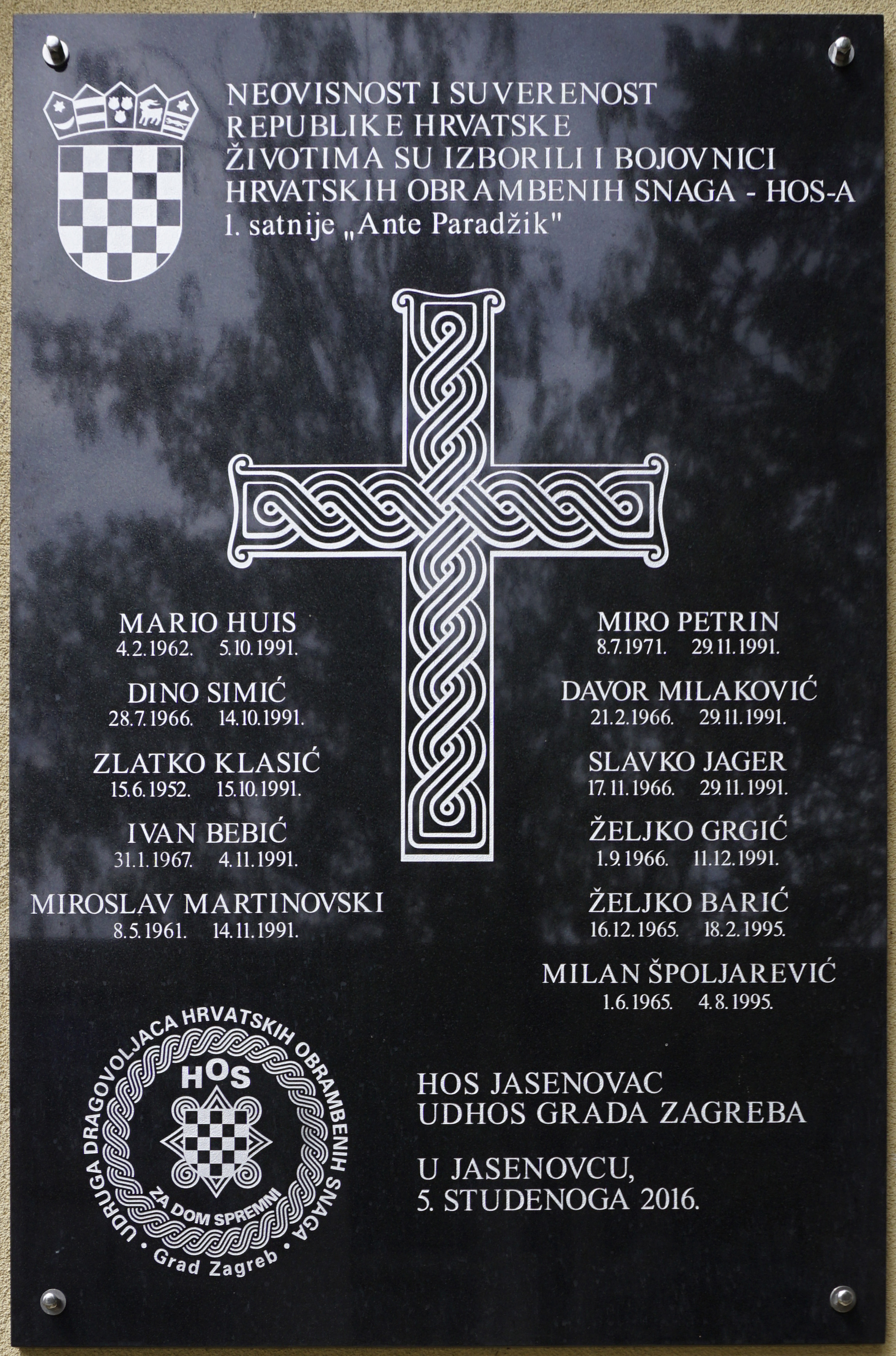 Spomen ploca u Jasenovcu